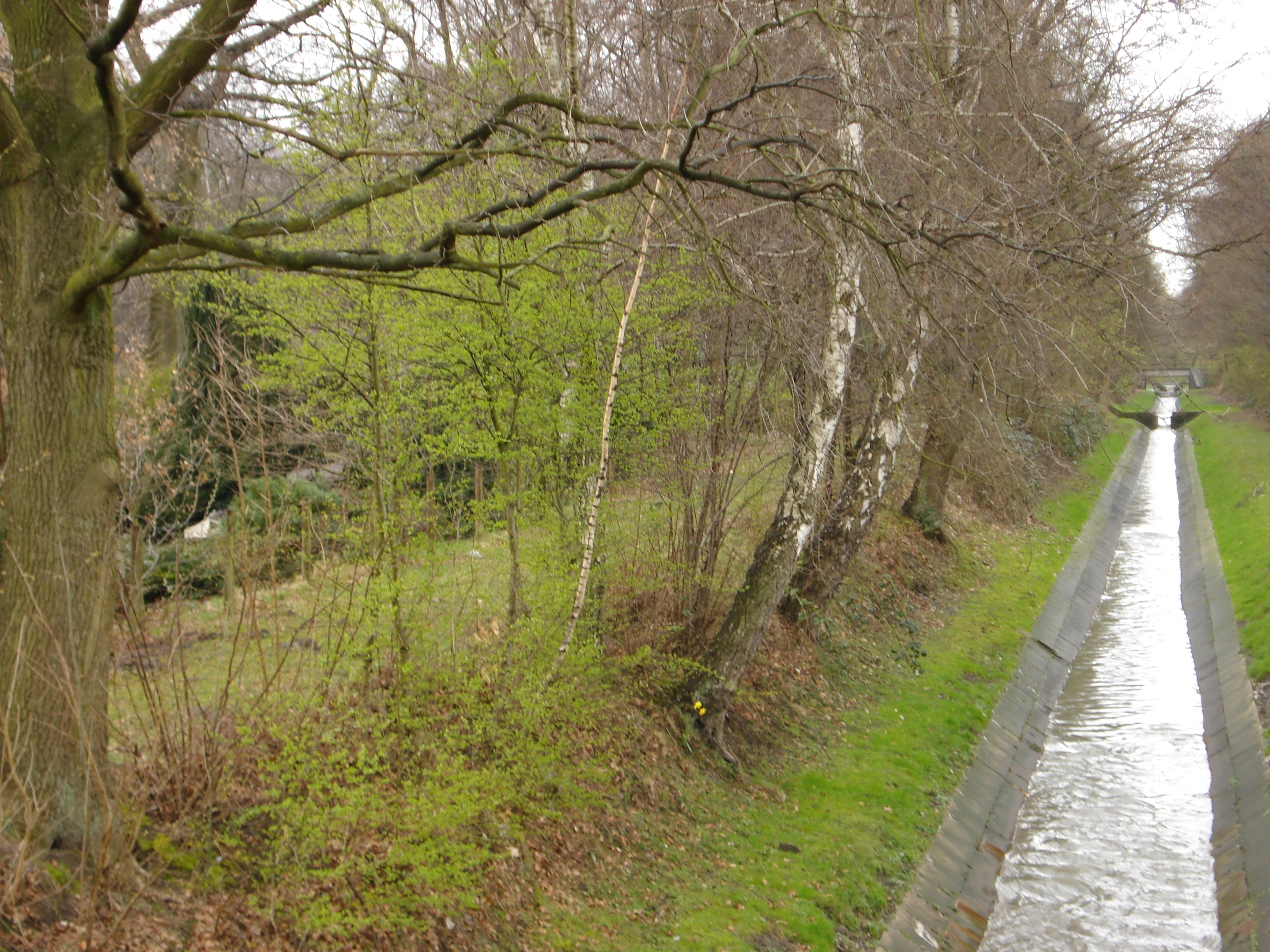 Der Hellbach an der Brücke Kärntener Straße in Recklinghausen nach Norden gesehen